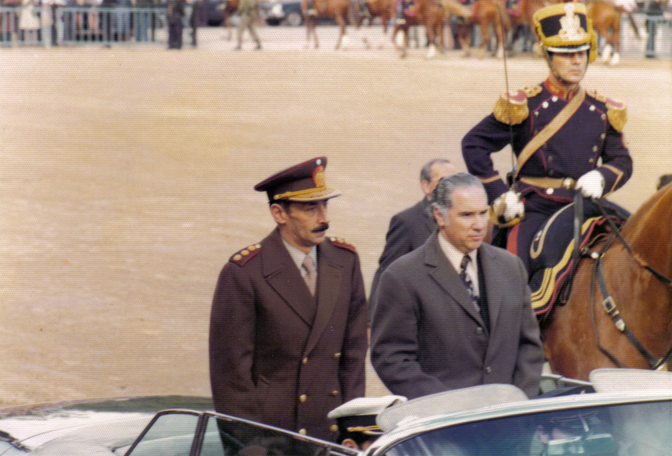 Argentine dictator Jorge Rafael Videla at the opening of 1976's "Exposición Rural" in Palermo, Buenos Aires El dictador argentino Jorge Rafael Videla en la inauguración de la Exposición Rural en Palermo, Buenos Aires, en 1976.